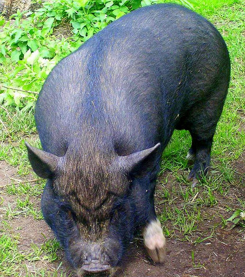 Minigris (Sus scrofa): Ursprunget till de svenska minigrisarna är okänt. Helt klart är att minigrisen är en korsningsgris av olika raser. Detta visar sig i att även syskon från samma kull kan se väldigt olika ut och vara olika stora. Normalvikten på en minigris är omkring 40 kg, men de kan ibland väga 90 kg.